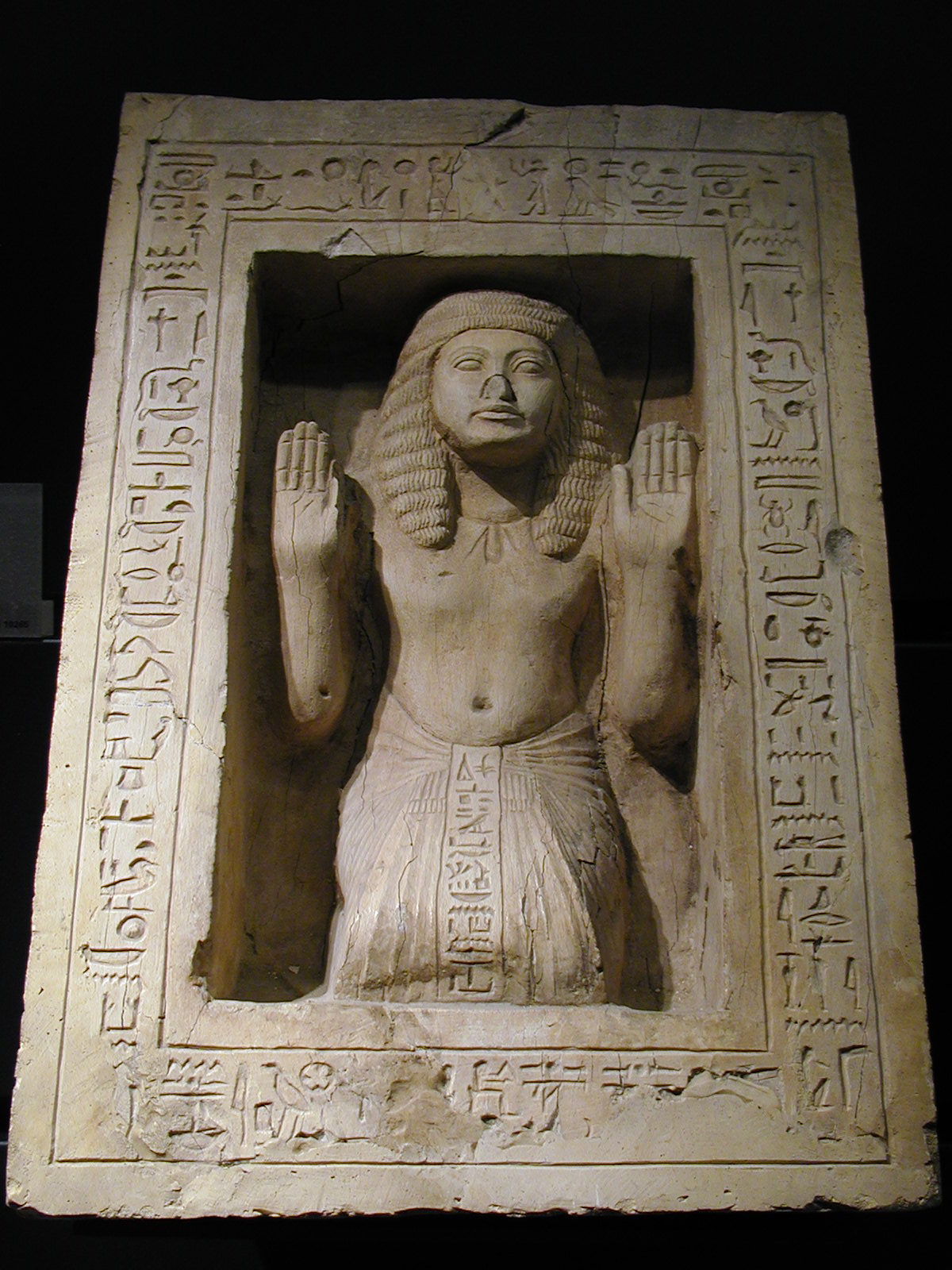 Fenêtre du sommet de la pyramide de Minnakht